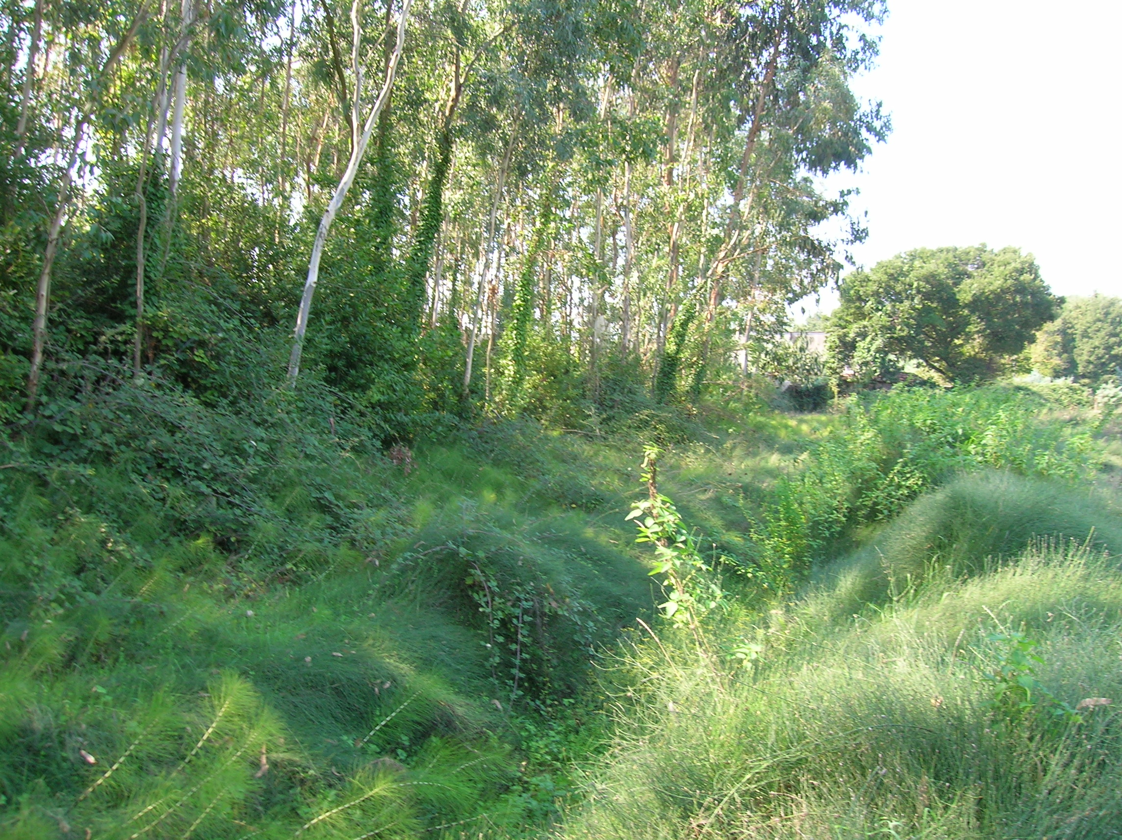 Il fosso in cui è visibile qualche pianta di equiseto. Parco della Cellulosa, Roma, Lazio, Italia.